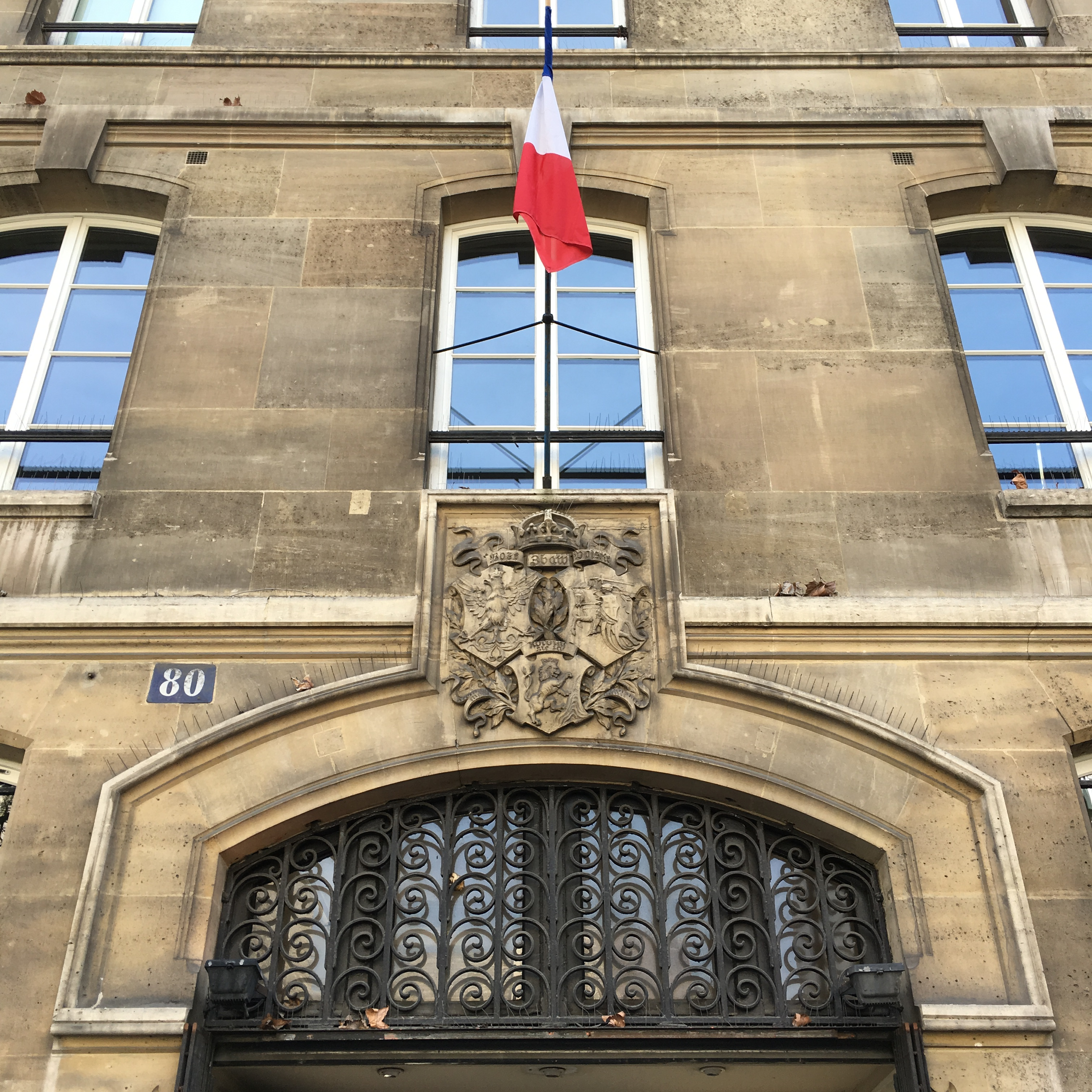 Ancienne école supérieure polonaise. Fondateur : Adam Jerzy Czartoryski. Architecte : Viollet-Le-Duc. 80 boulevard du Montparnasse, Paris 14e.